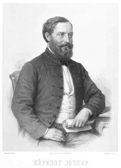 Képessy József (1818-1876) vízépítő mérnök